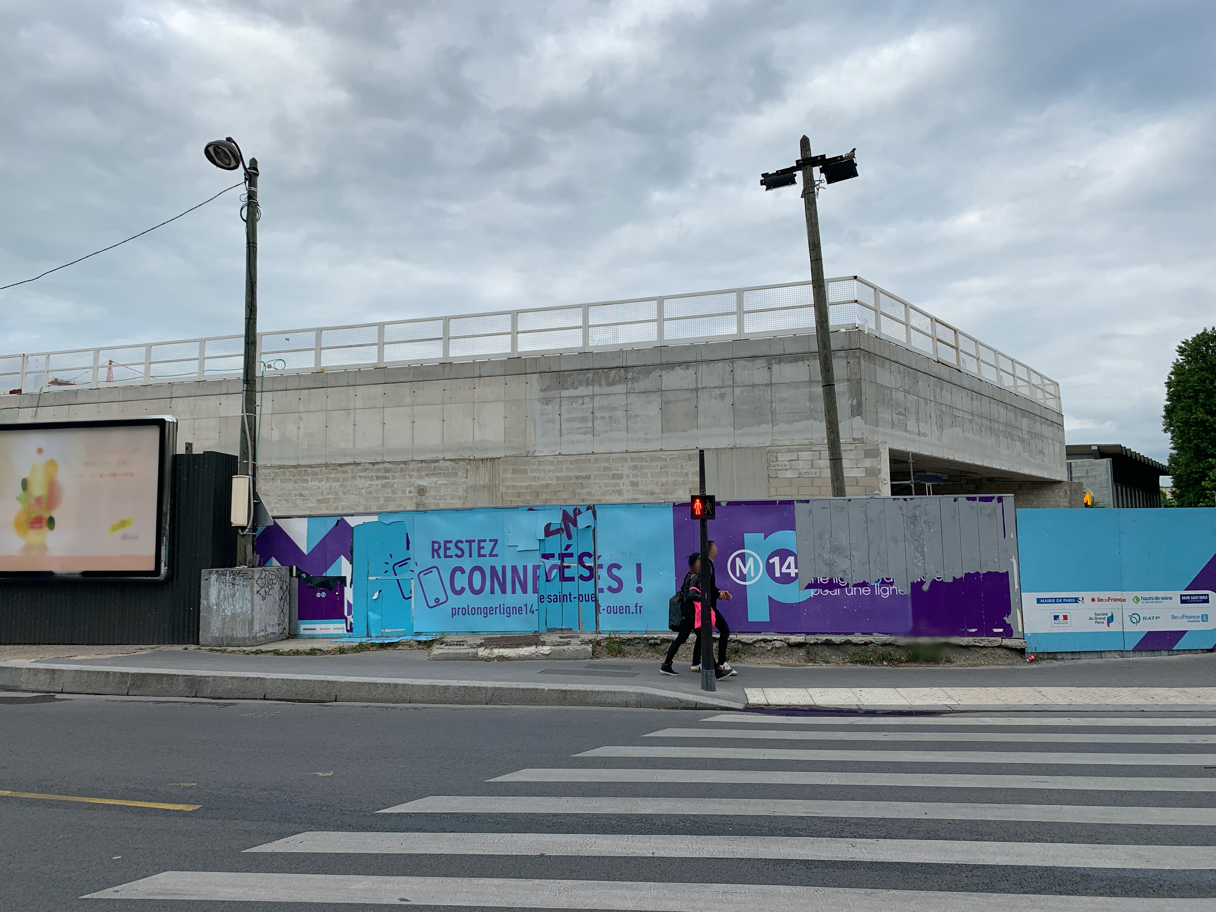 Chantier de la station de métro Porte de Clichy, ligne 14 du métro de Paris, Paris.